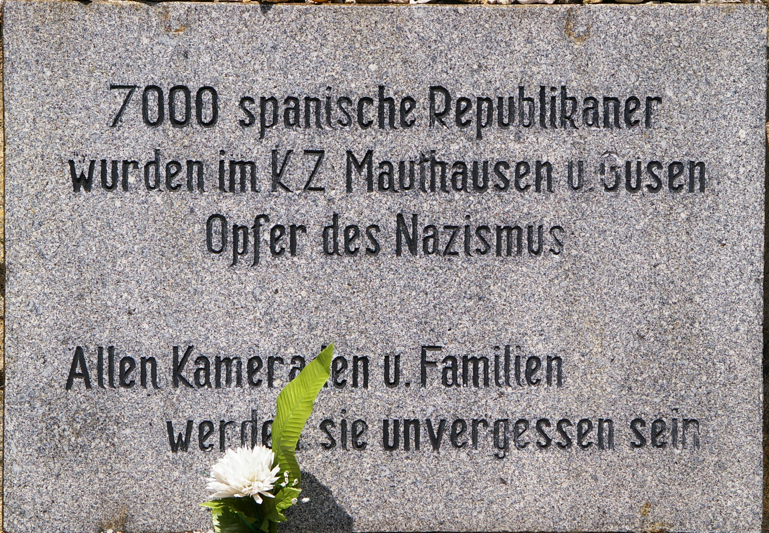 Gedenktafel für die spanisch-republikanischen Opfer in Mauthausen